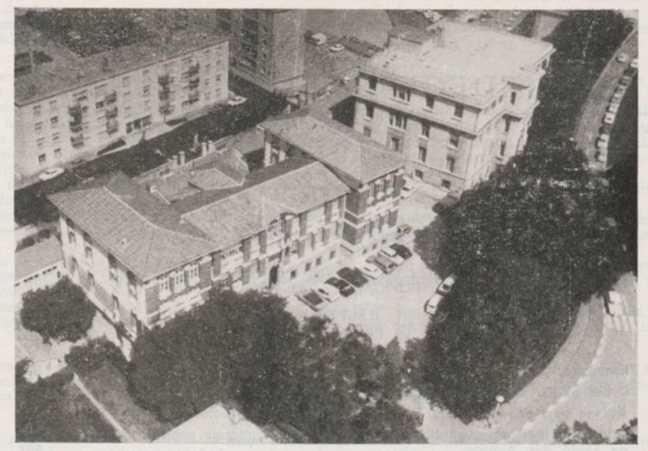 vue aérienne des deux principaux bâtiment de l'école du Pharo en 1980